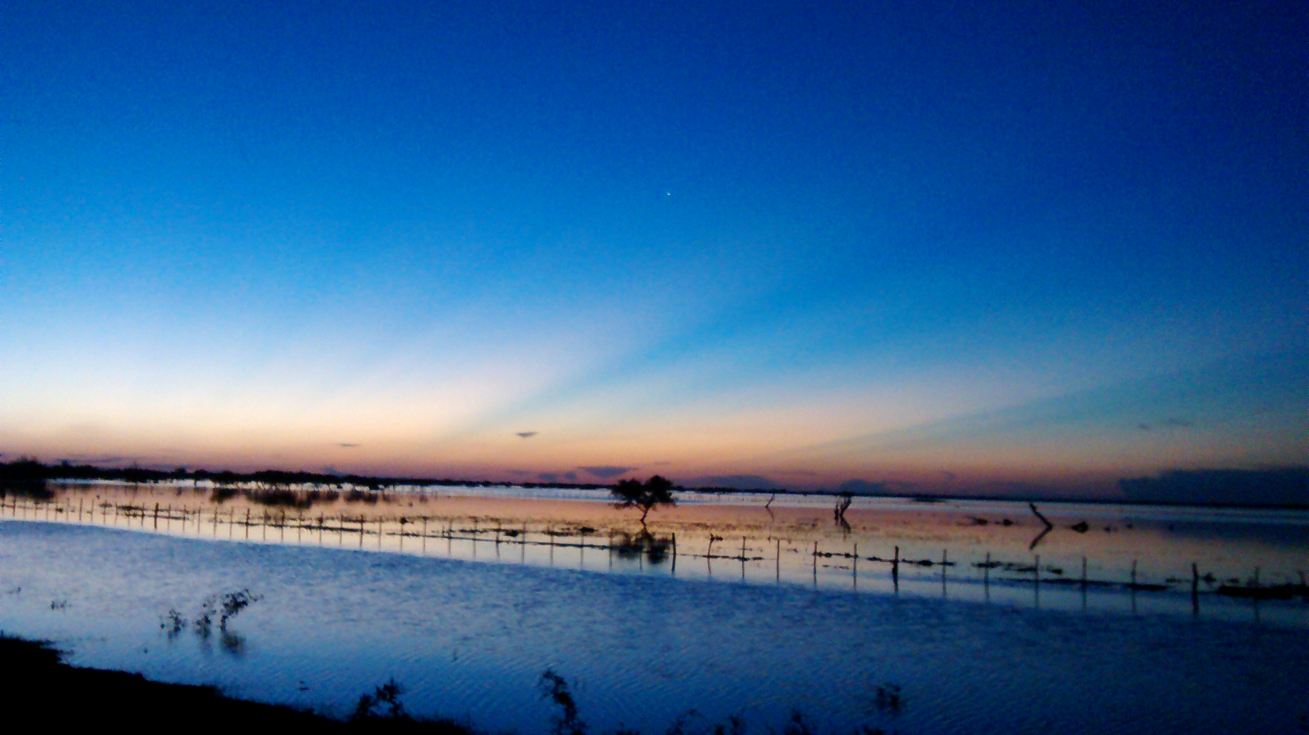 Rio dulce, con sus bañados en epocas de verano.